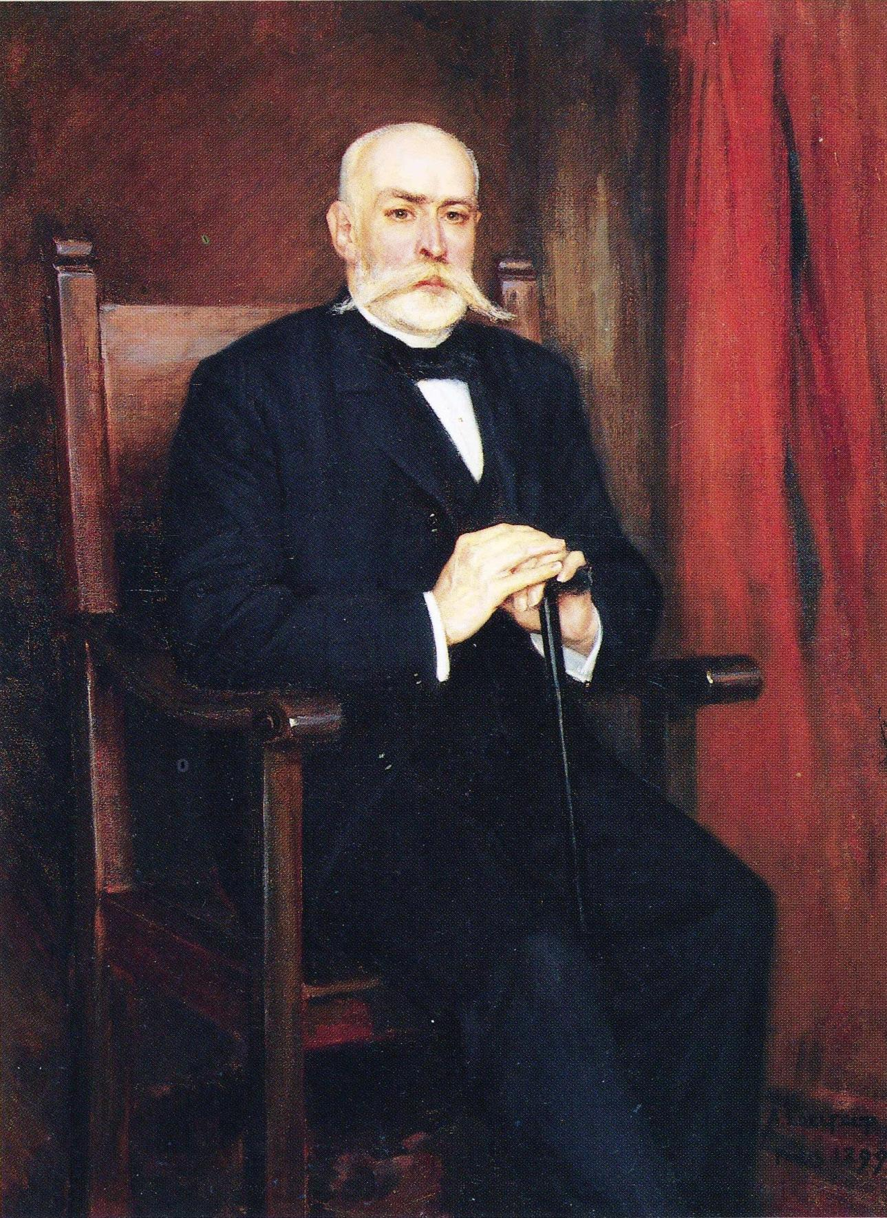 Ministerivaltiosihteeri, jalkaväenkenraali Woldemar Carl von Daehn (1838–1900). Muotokuva kuuluu Helsingin yliopiston kokoelmiin.